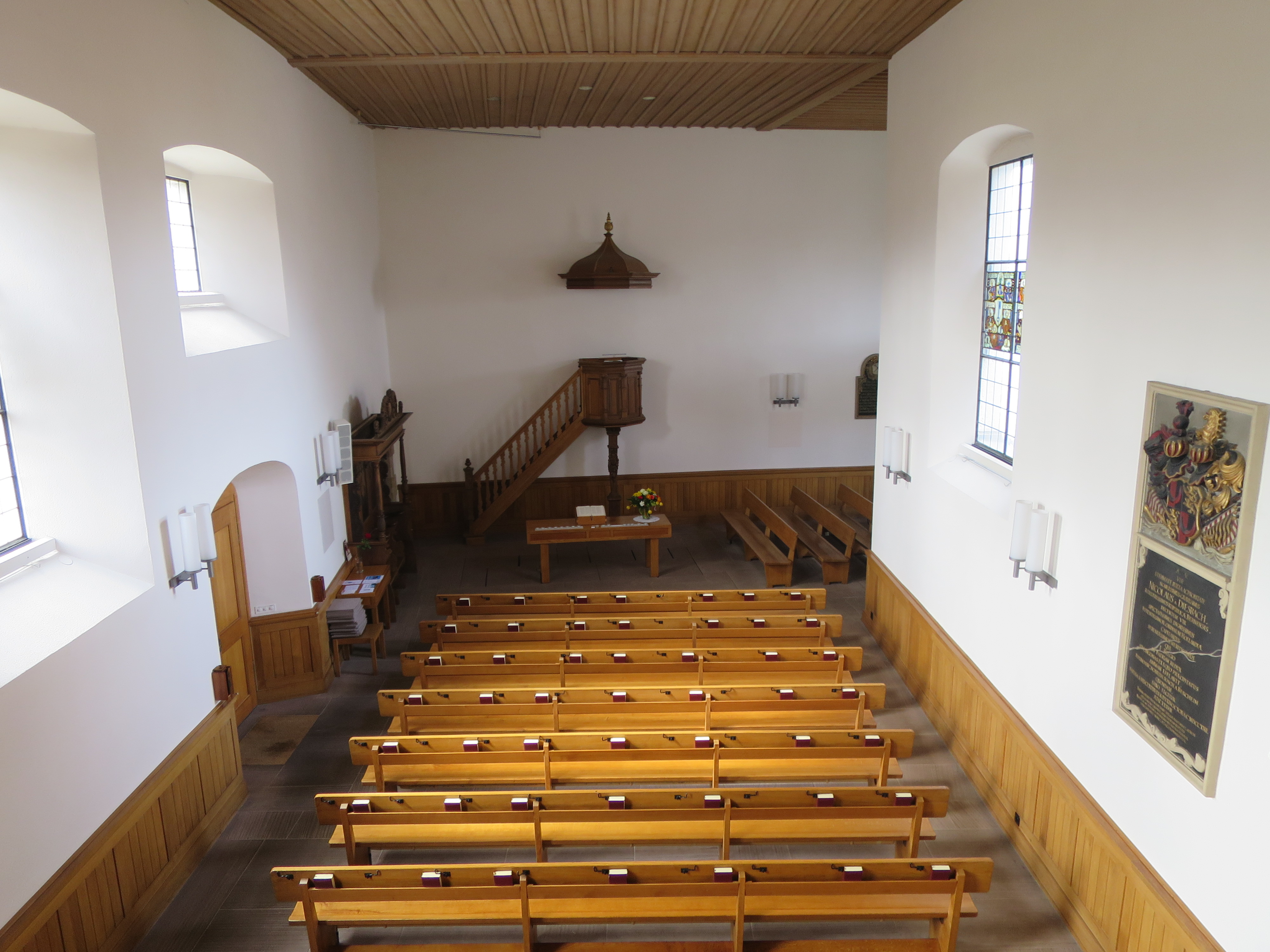 Margarethenkirche Binningen, Schweiz, Liturgiezone